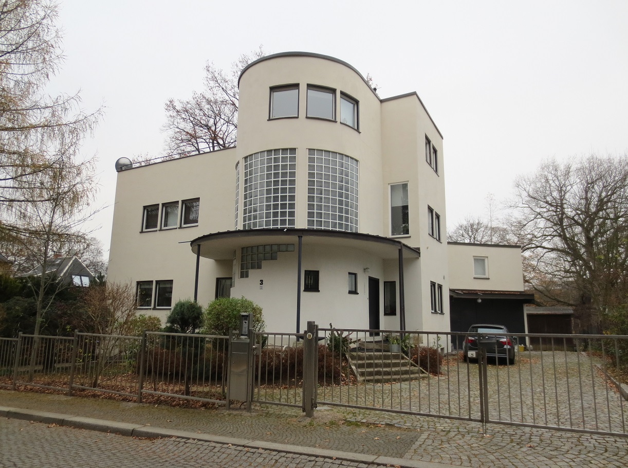 Kulturdenkmal Chemnitz Schloßchemnitz.